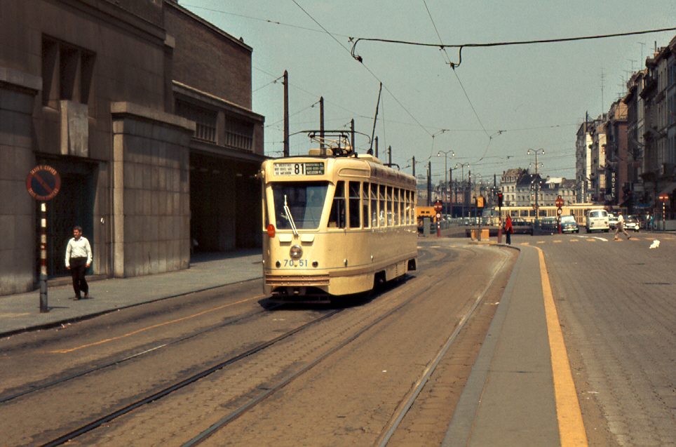 PCC by Brussel Midi station. To the left.